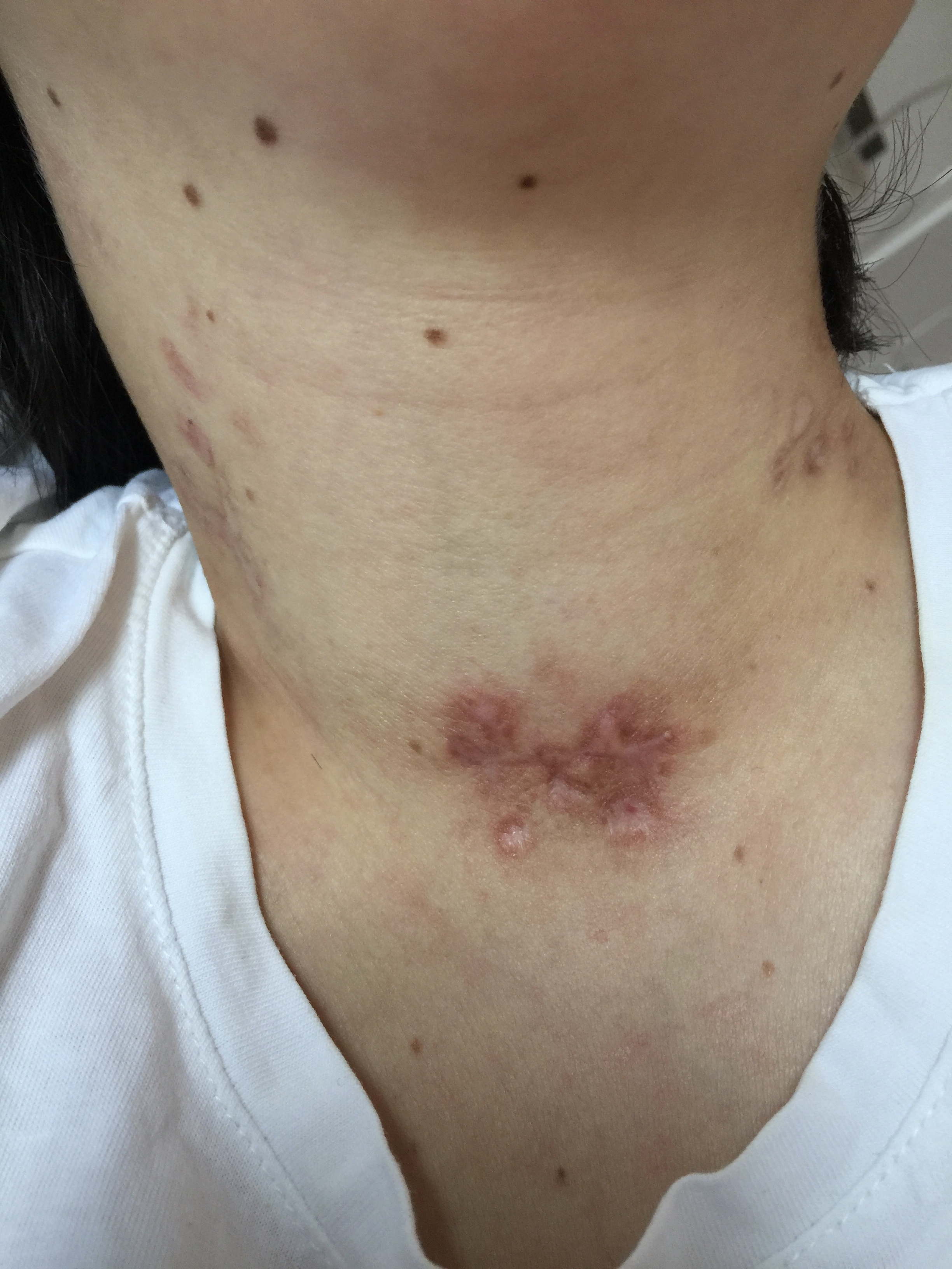 Once dias despues de cerrar la traqueostomía